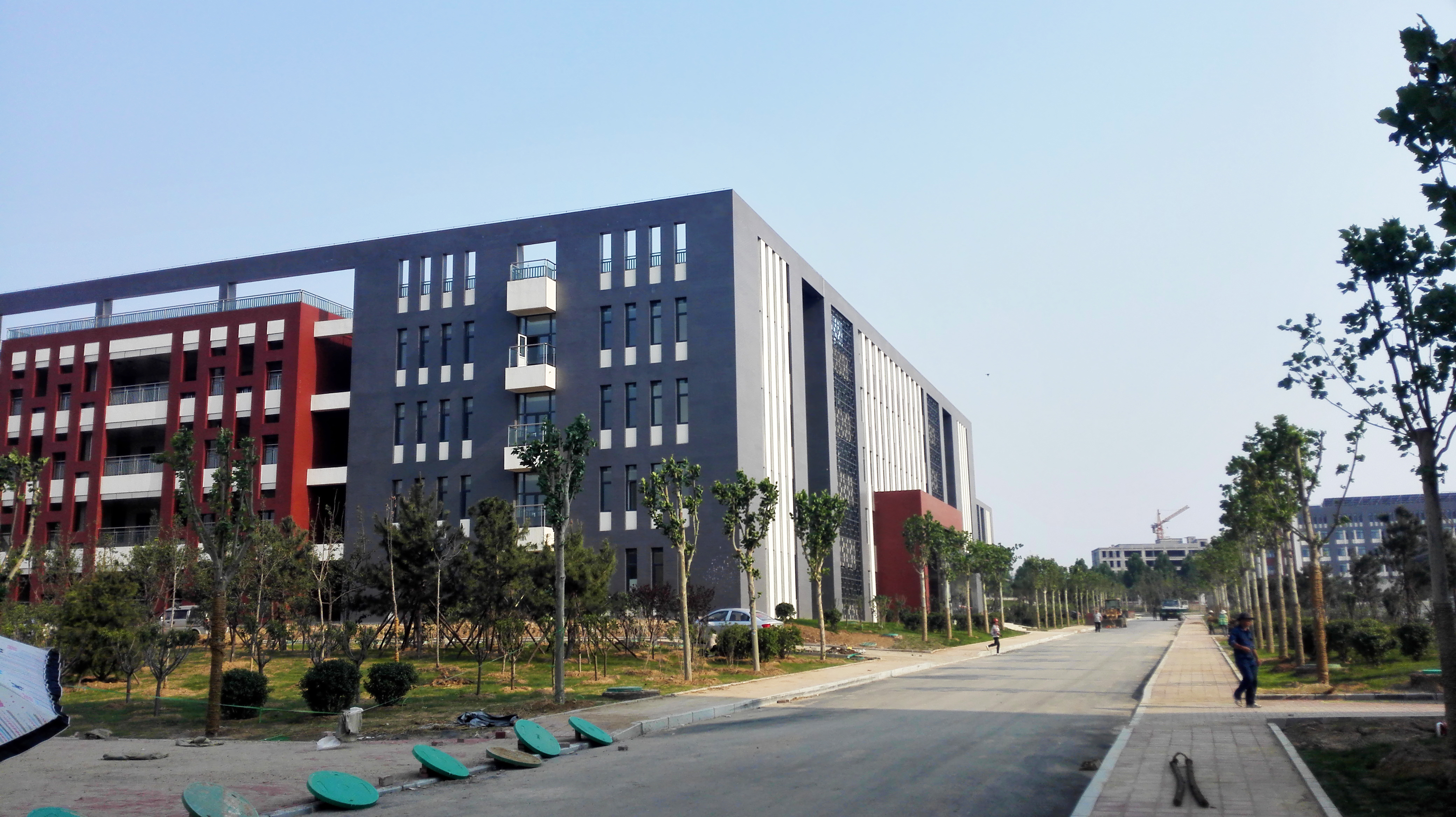 中文（中国大陆）: 泰安一中新校教学楼外景